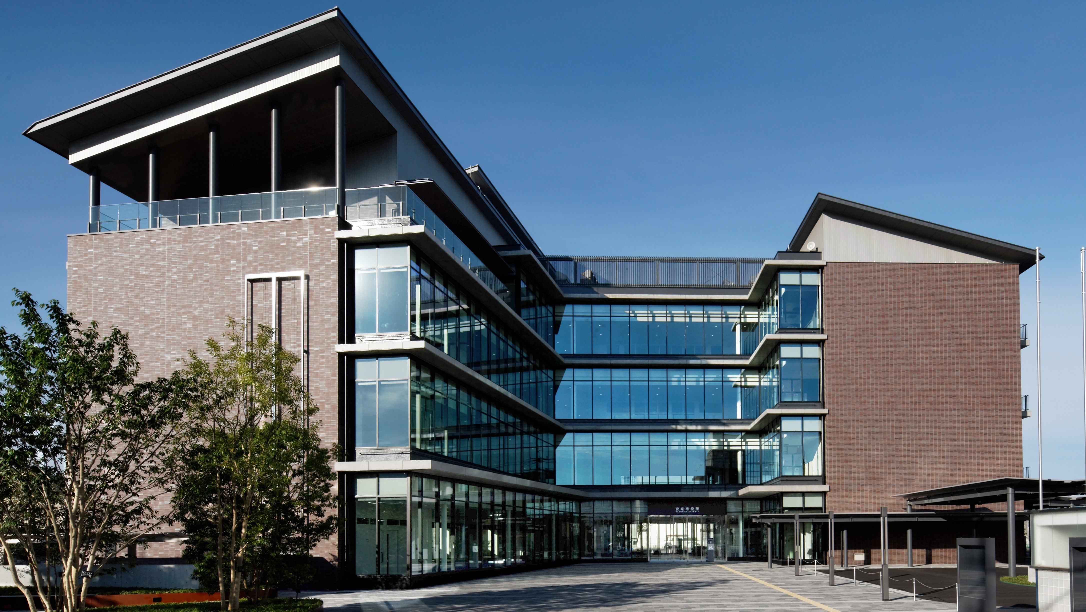 安来市役所安来庁舎